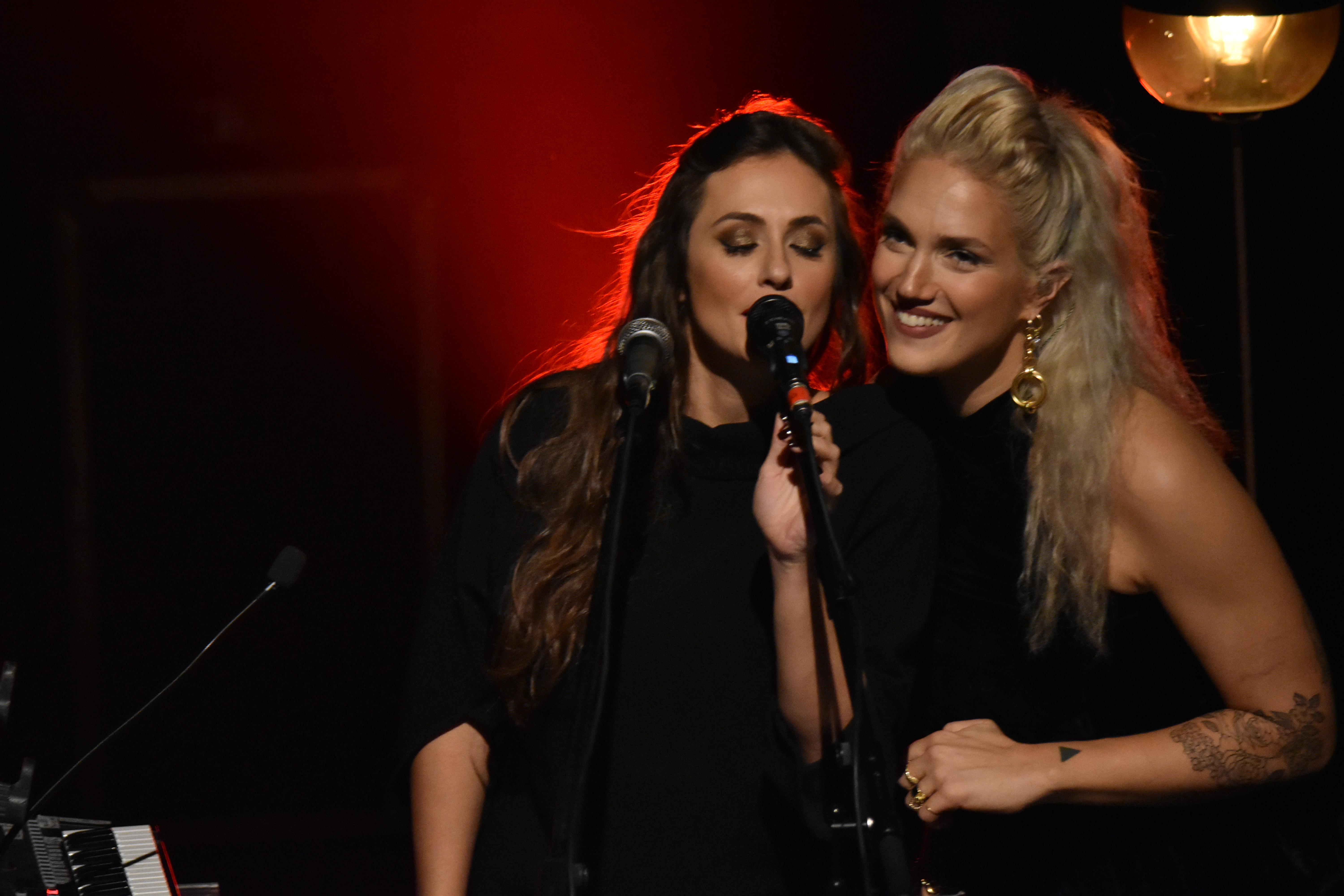 מארינה מקסימיליאן וקרן פלס, פסטיבל הפסנתר, 2018